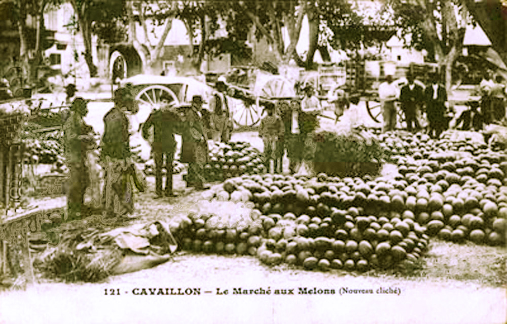 Marché aux melons à Cavaillon vers 1913